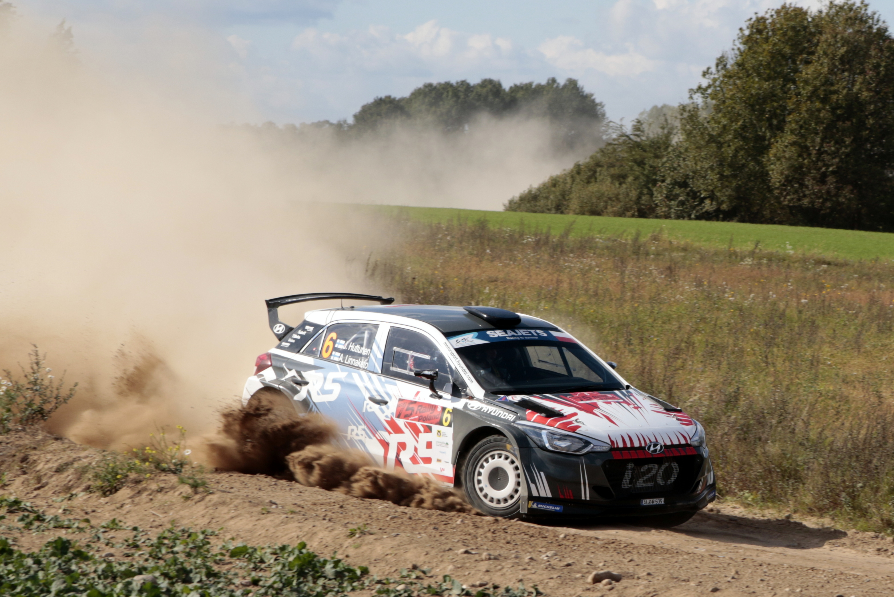 Rajd Polski - 2018 Jari Huttunen